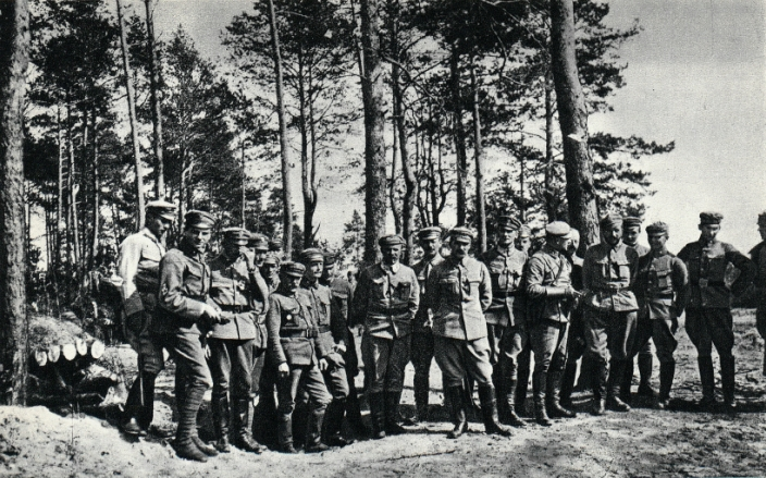 Józef Piłsudski w otoczeniu oficerów II batalionu 5. Pułku Piechoty w Lasku Polskim na Wołyniu.